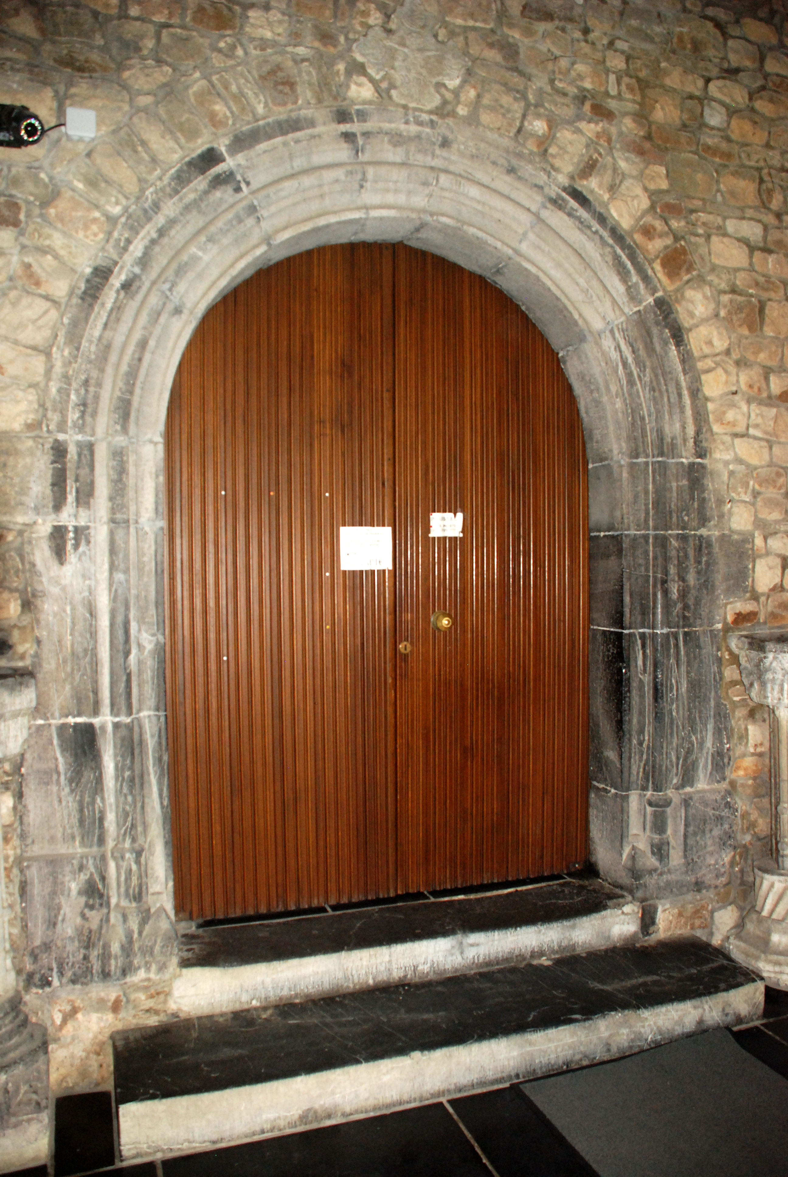 Belgique - Wallonie - Église Saints-Hermès-et-Alexandre de Theux